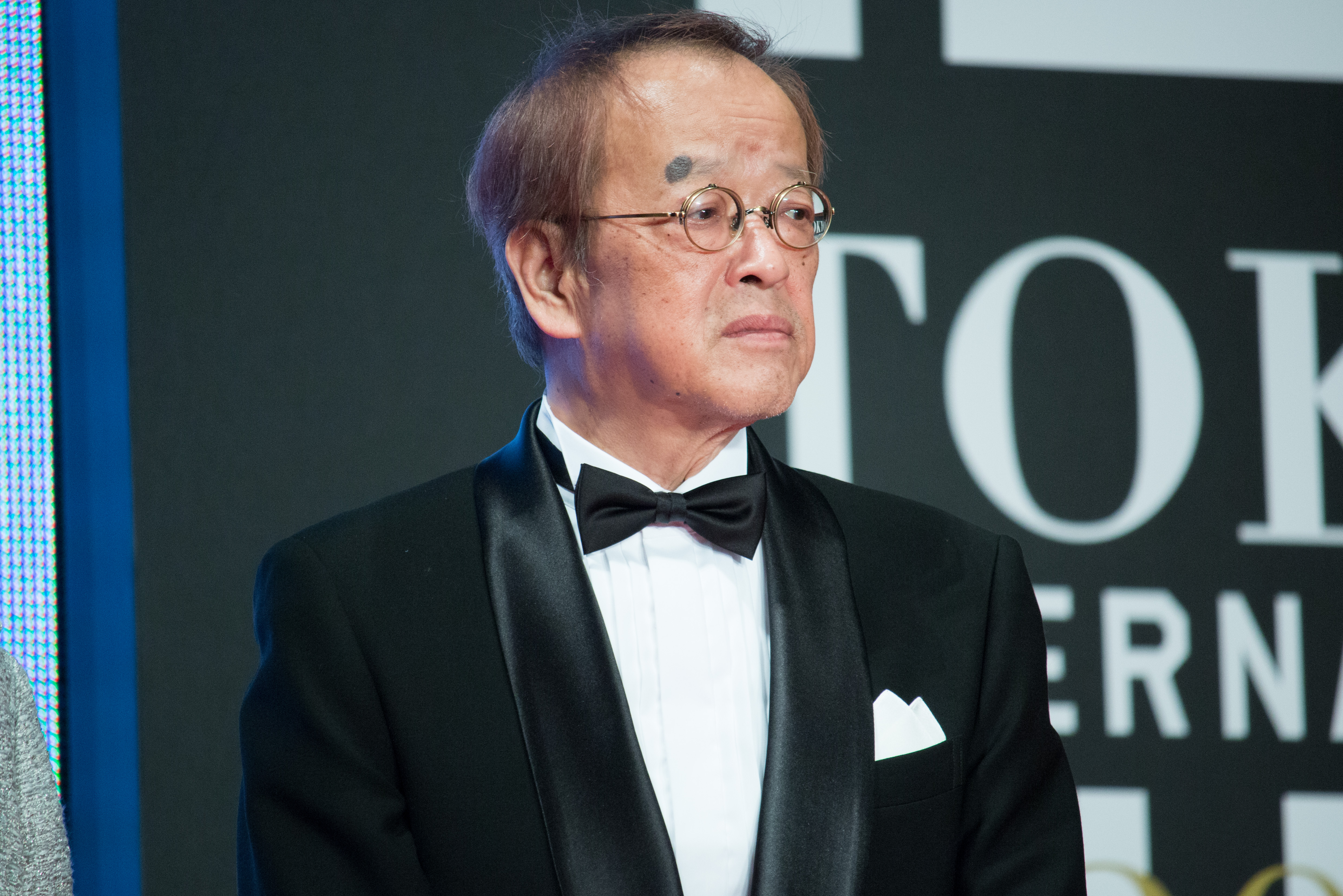 第28回 東京国際映画祭 オープニングセレモニー 大森一樹 (審査員)